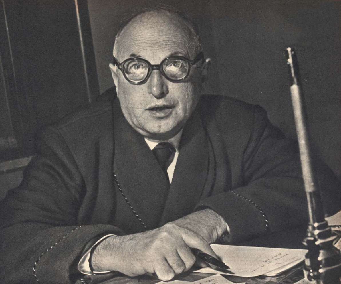 Italian politician Pietro Nenni